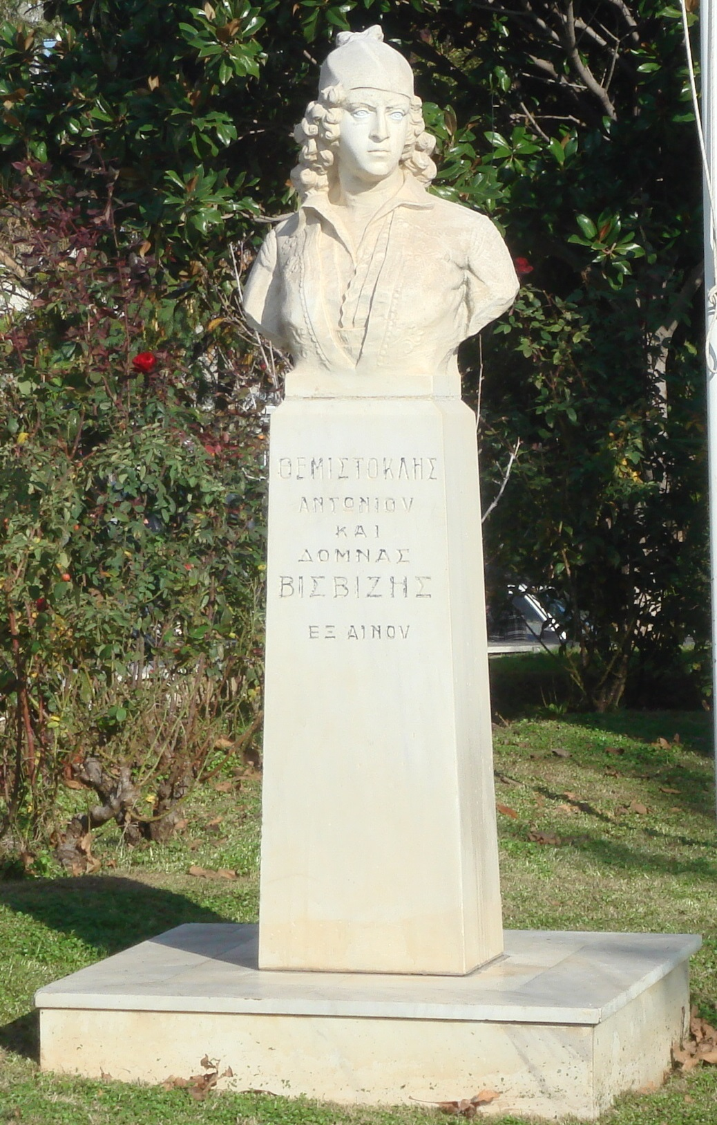 Προτομή του Θεμιστοκλή Βισβίζη, στην πλατεία Φάρου Αλεξανδρούπολης